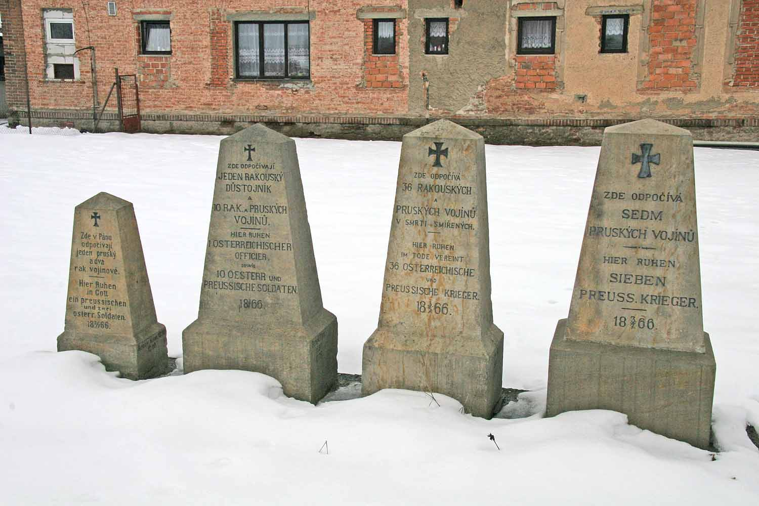 pomník bitvy u Hradce Králové v roce 1866